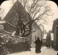 Ehemalige Synagoge in Kronberg im Taunus, 1927 abgerissen